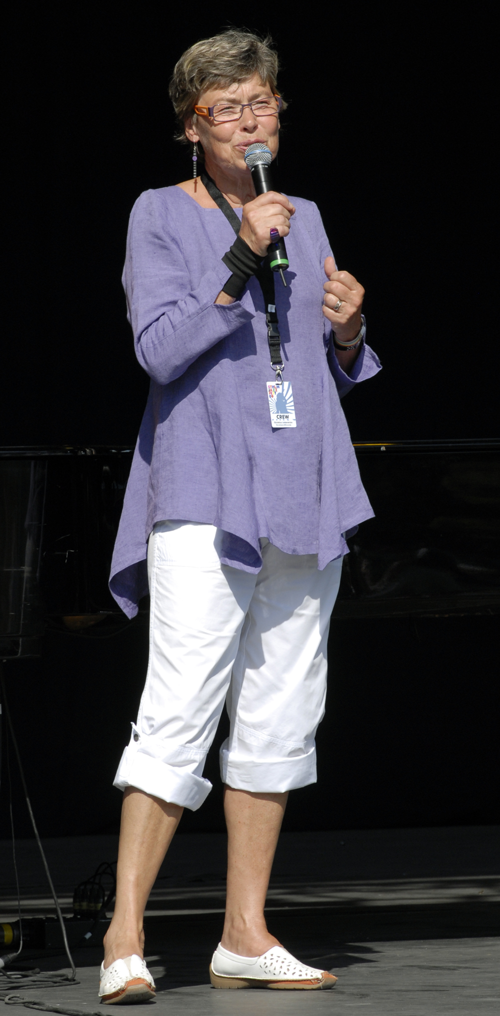 Christina Jutterstöm opening the 2009 Stockholm Jazz Festival